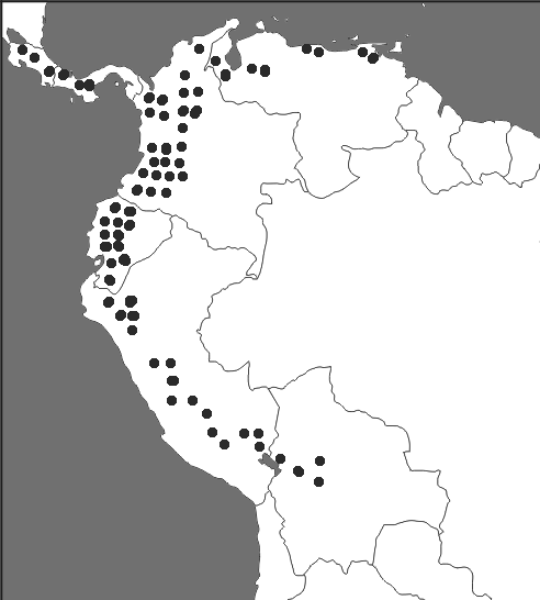 répartition de Cinchona pubescens, d'après Lennart Andersson, A Revision of the Genus Cinchona (Rubiaceae - Cinchoneae), Memoirs of the New York Botanical Garden, 80, 1998.